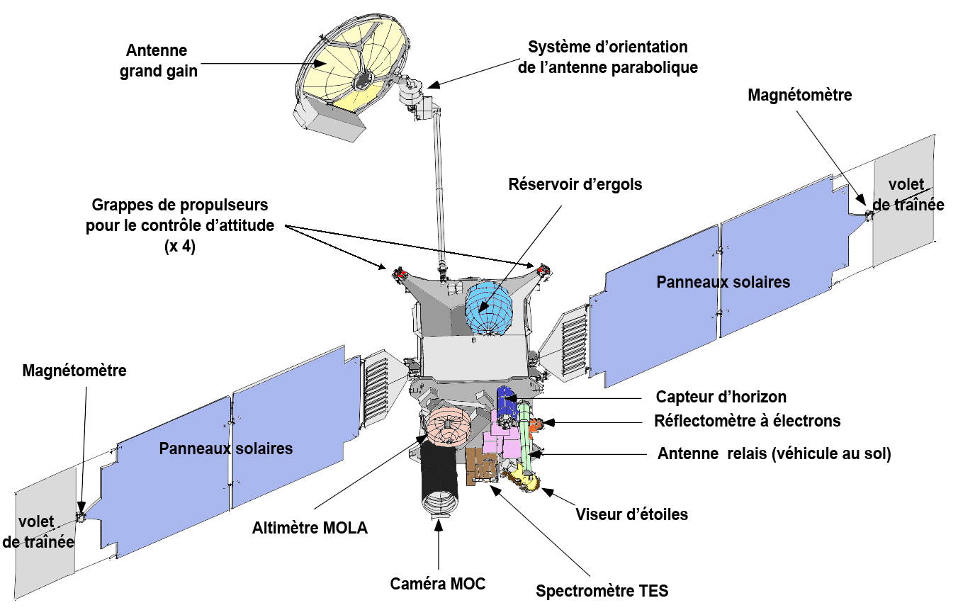 Mars Global Surveyor with-french-labels